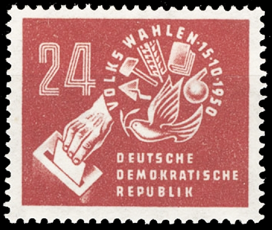 Les élections de 1950 à la Volkskammer (Chambre du peuple)